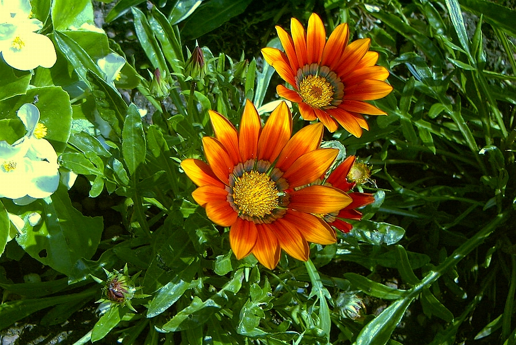 Gazanie